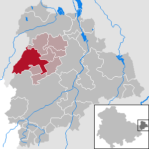 Starkenberg in Thuringia - District Altenburger Land